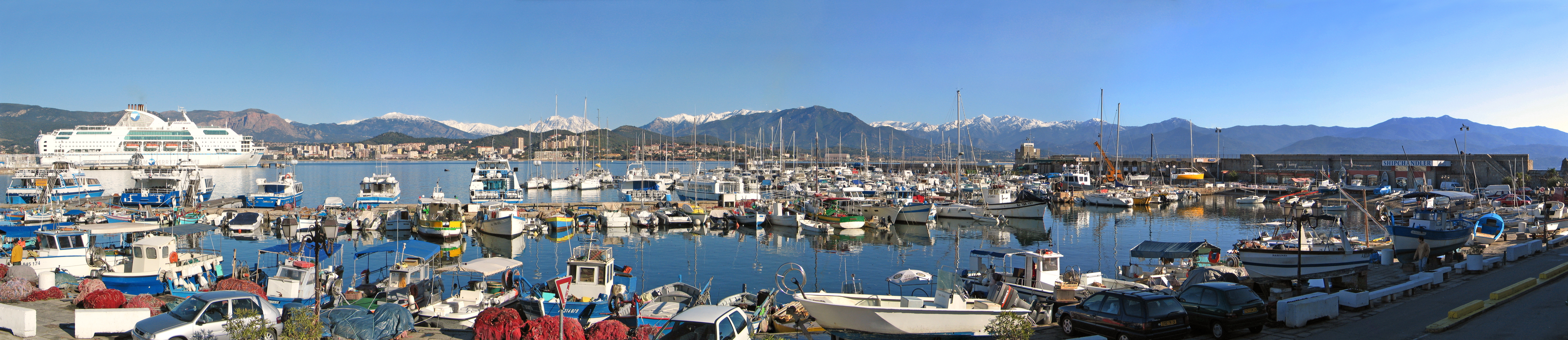 Vue panoramique du port d'Ajaccio